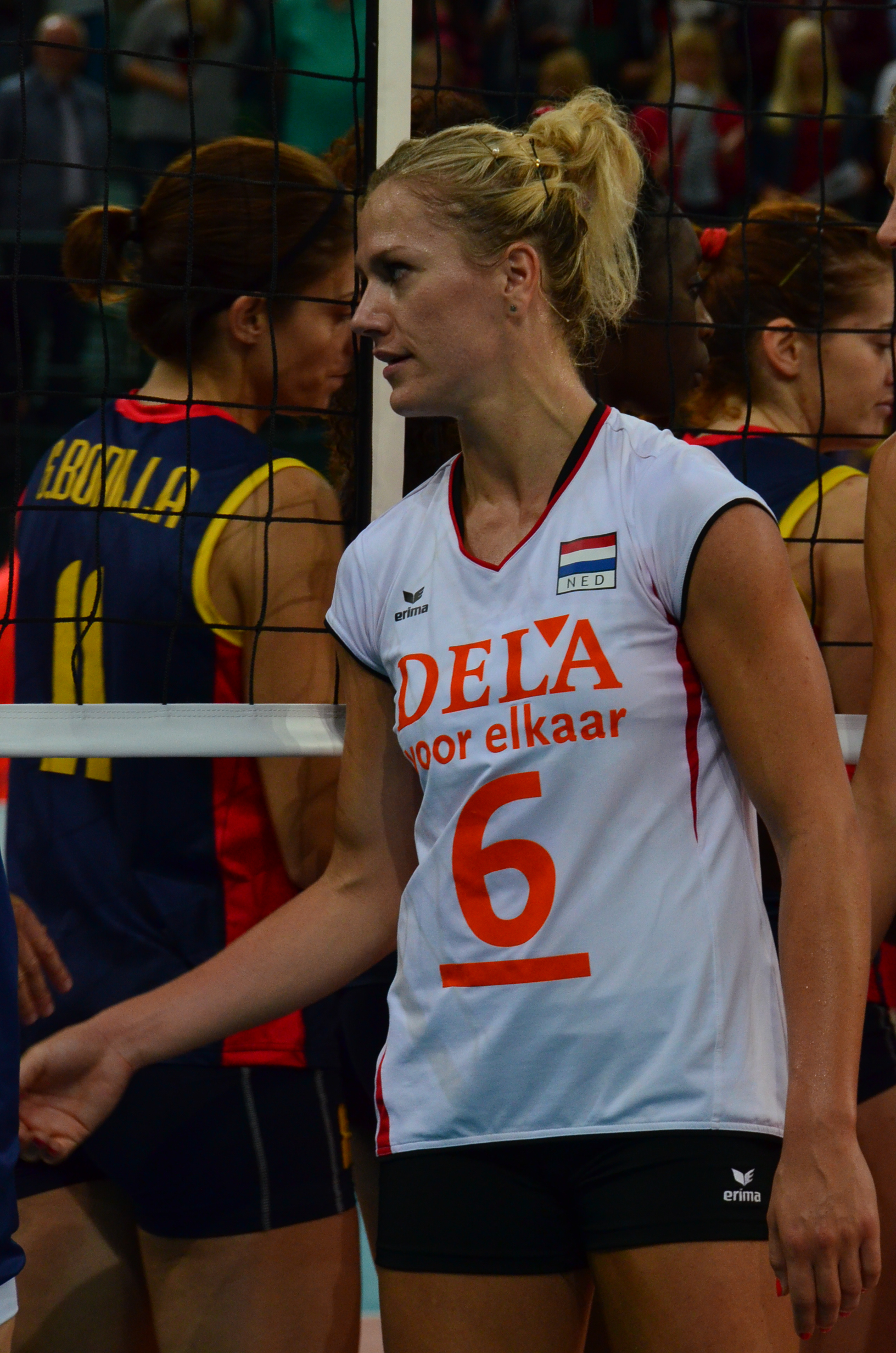 Volleyball-Europameisterschaft der Frauen 2013-Spielort Halle (Westf) Gerry-Weber-Stadion - Spiel 8. September 2013 (Spanien-Niederlande)